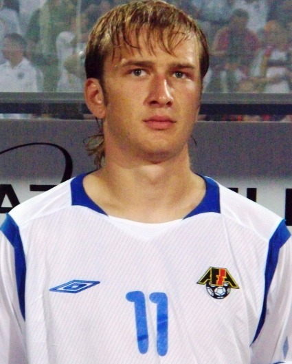 футболист Даниэль Ахтямов (Азербайджан)